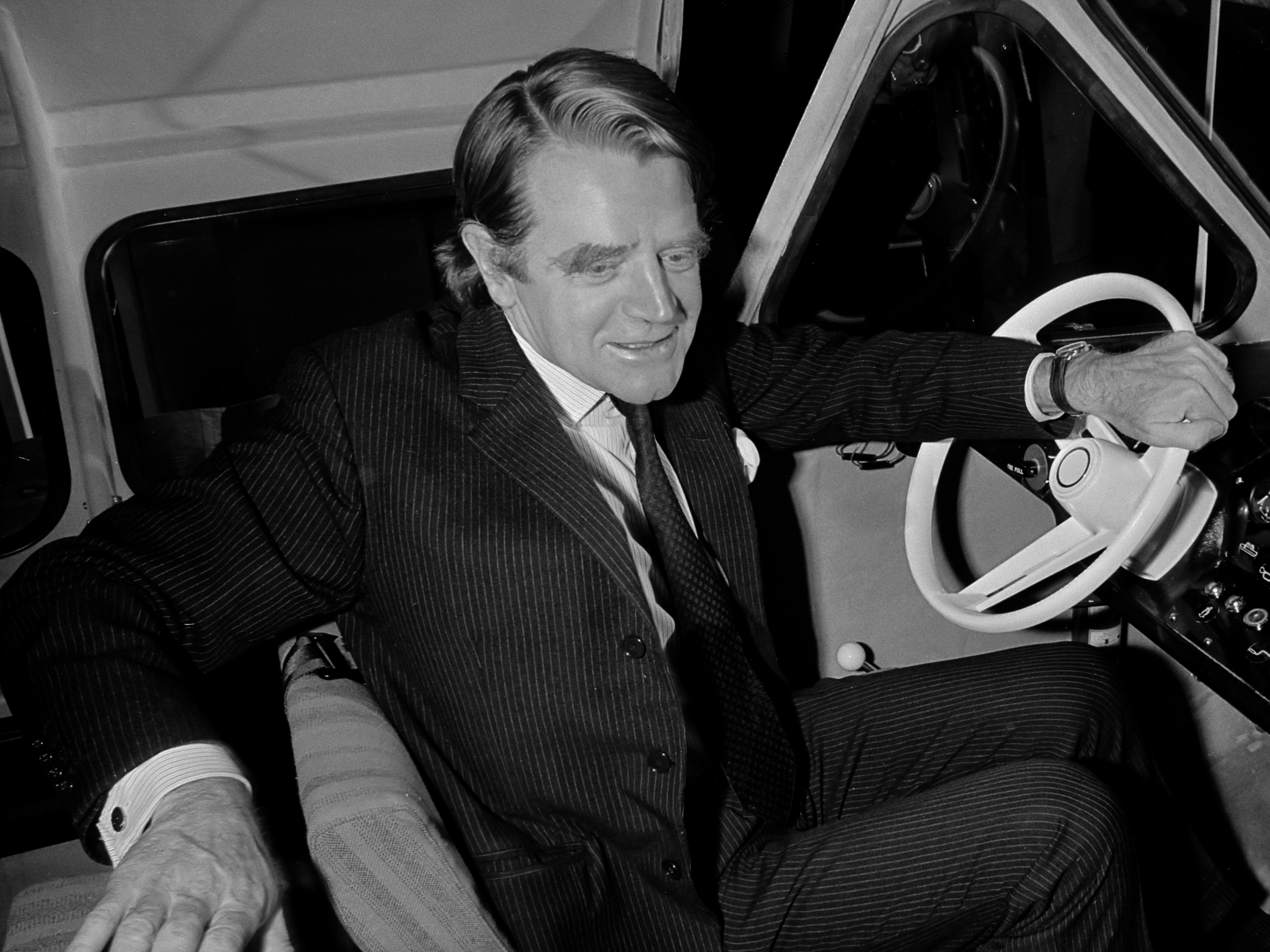 Tentoonstelling Europort 1972 geopend in de RAI, Minister Chris Chataway aan stuur hoovercraft 14 november 1972